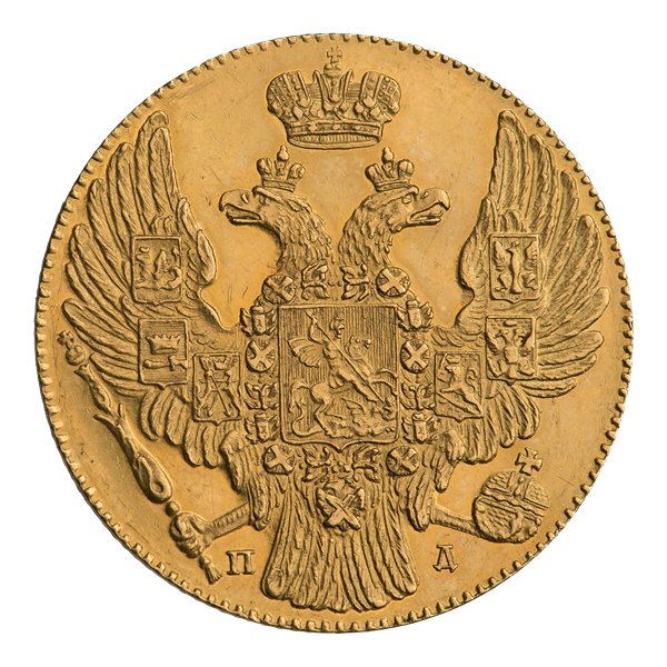 Пять рублей 1832 г. Памятная монета (аверс). ГМ 102.VII.2; Биткин 884 (R2). Государственный двуглавый орёл. Инициалы минцмейстера: П Д (Павел Данилов).